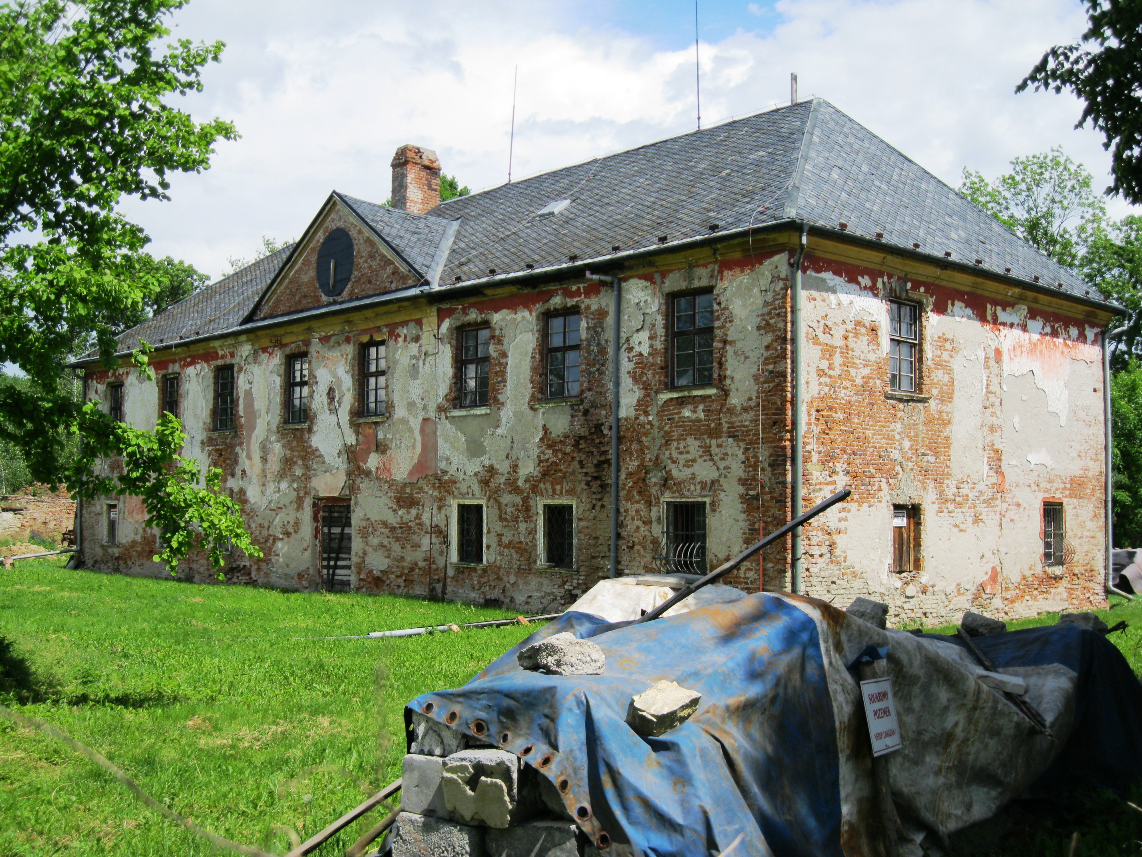 Zámek Nenakonice, Nenakonice 464